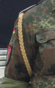 Schulterschnur, goldfarbend - Kompaniefeldwebelschnur (Spizname: Spieß, Muttern der Kompanie).